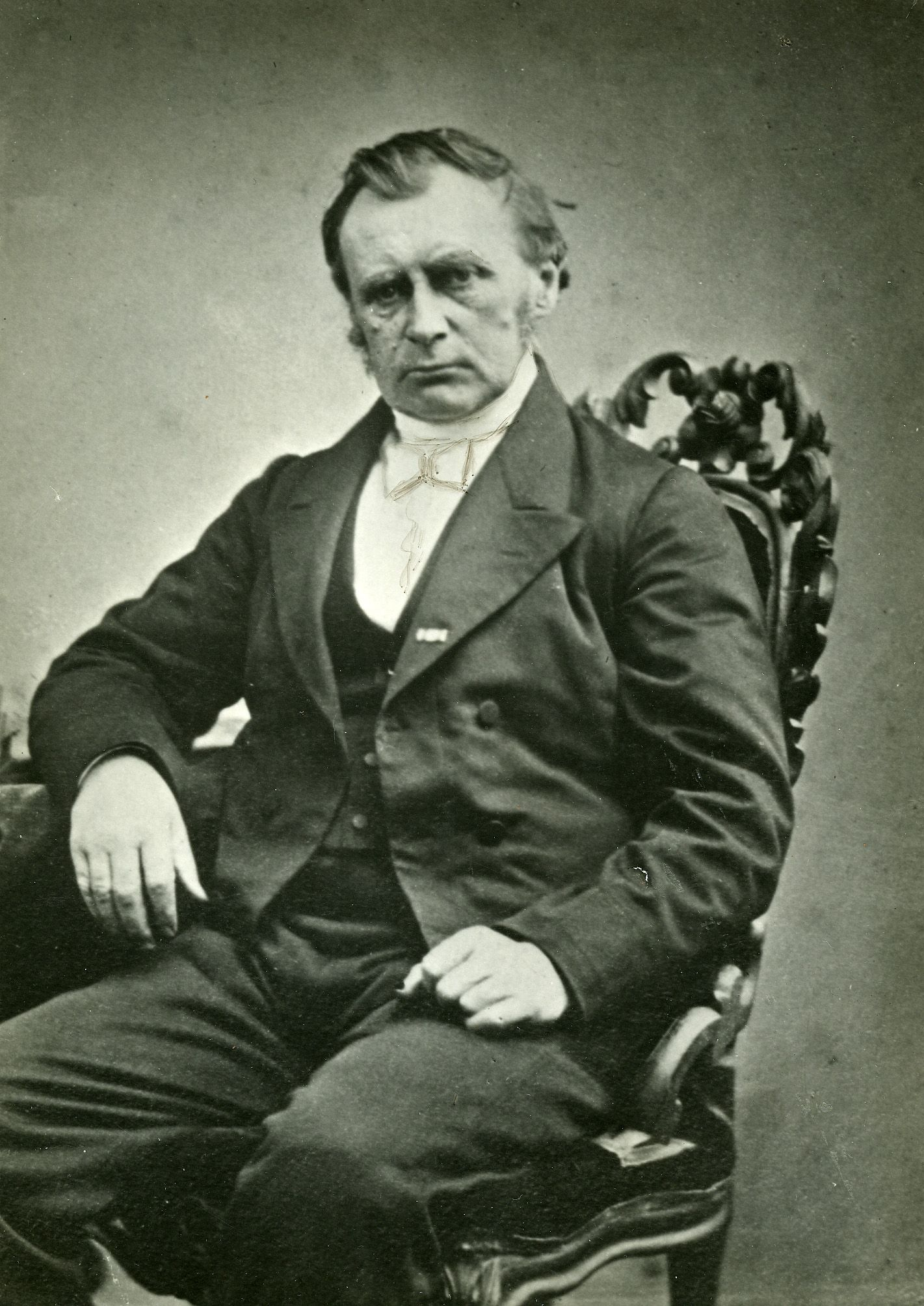 Mr. Albartus Telting (1803-1863)